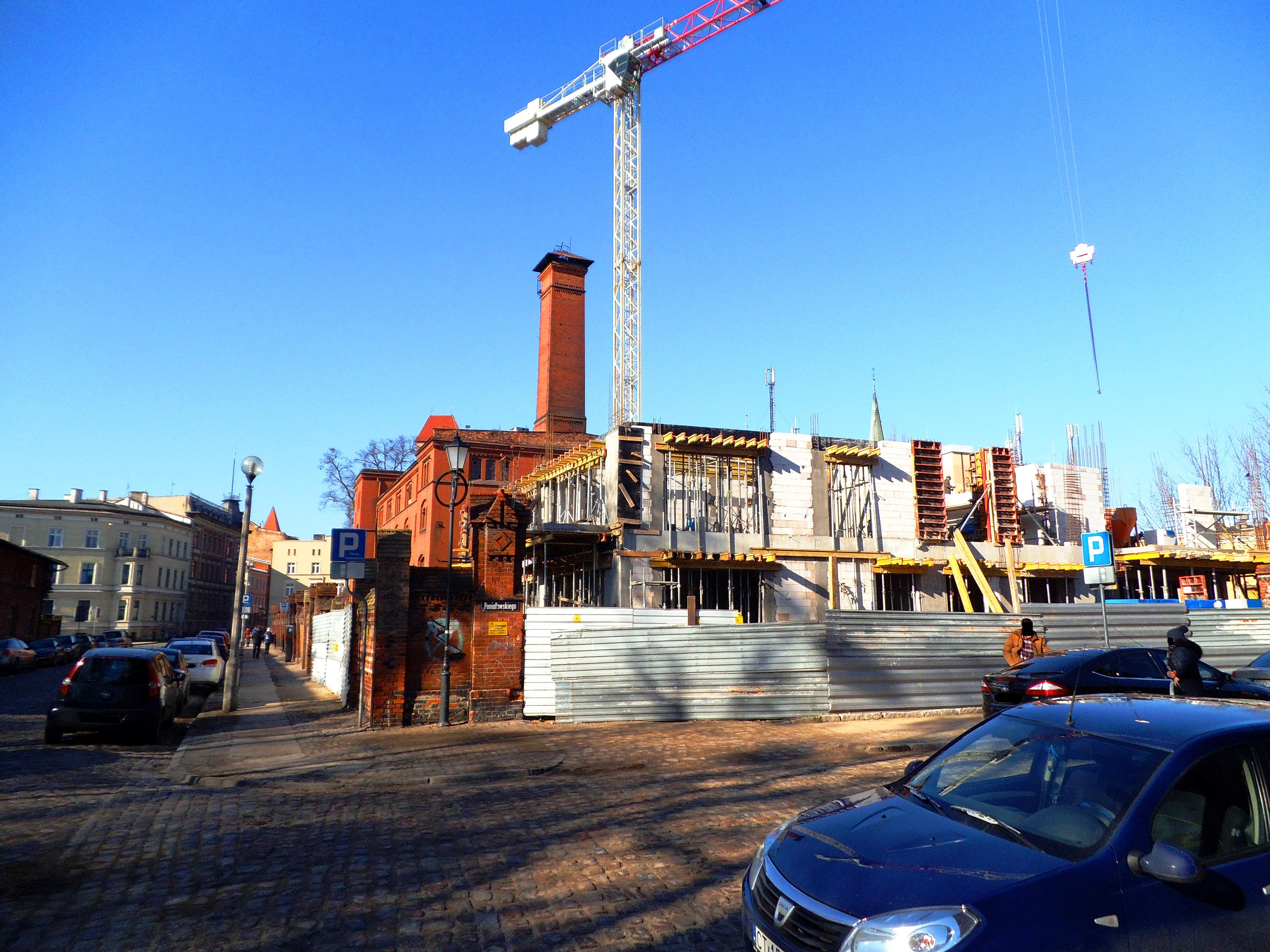 Budynek przy ul. św. Jakuba 14 w Toruniu